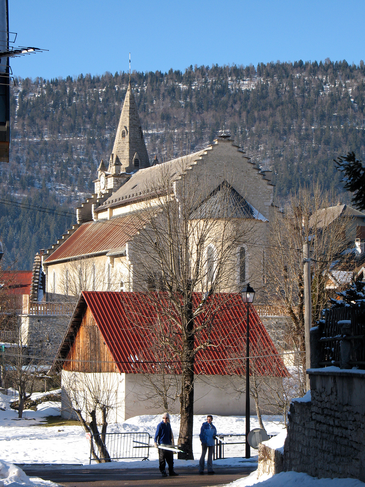 Cette photo a été prise lors de la dernière journée des rencontres 2009 de l'Internet d'Autrans